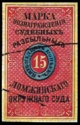 Марка сбора в пользу судебных рассыльных, Ломжинский окружной суд